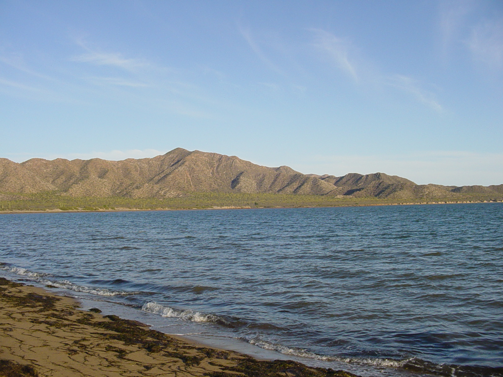 paisaje / landscape from Campo Hona looking south / Seri ejido / Sonora Mexico